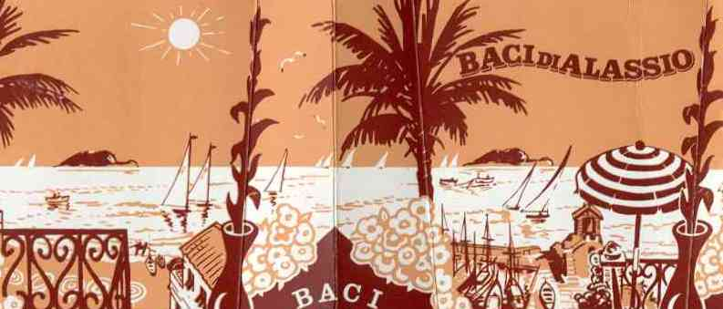 Mia elaborazione grafica della rèclame di un popolare dolcetto prodotto nella città ligure di Alassio --「Twice29.0 · contributi · talk」 00:27, 14 October 2005 (UTC)